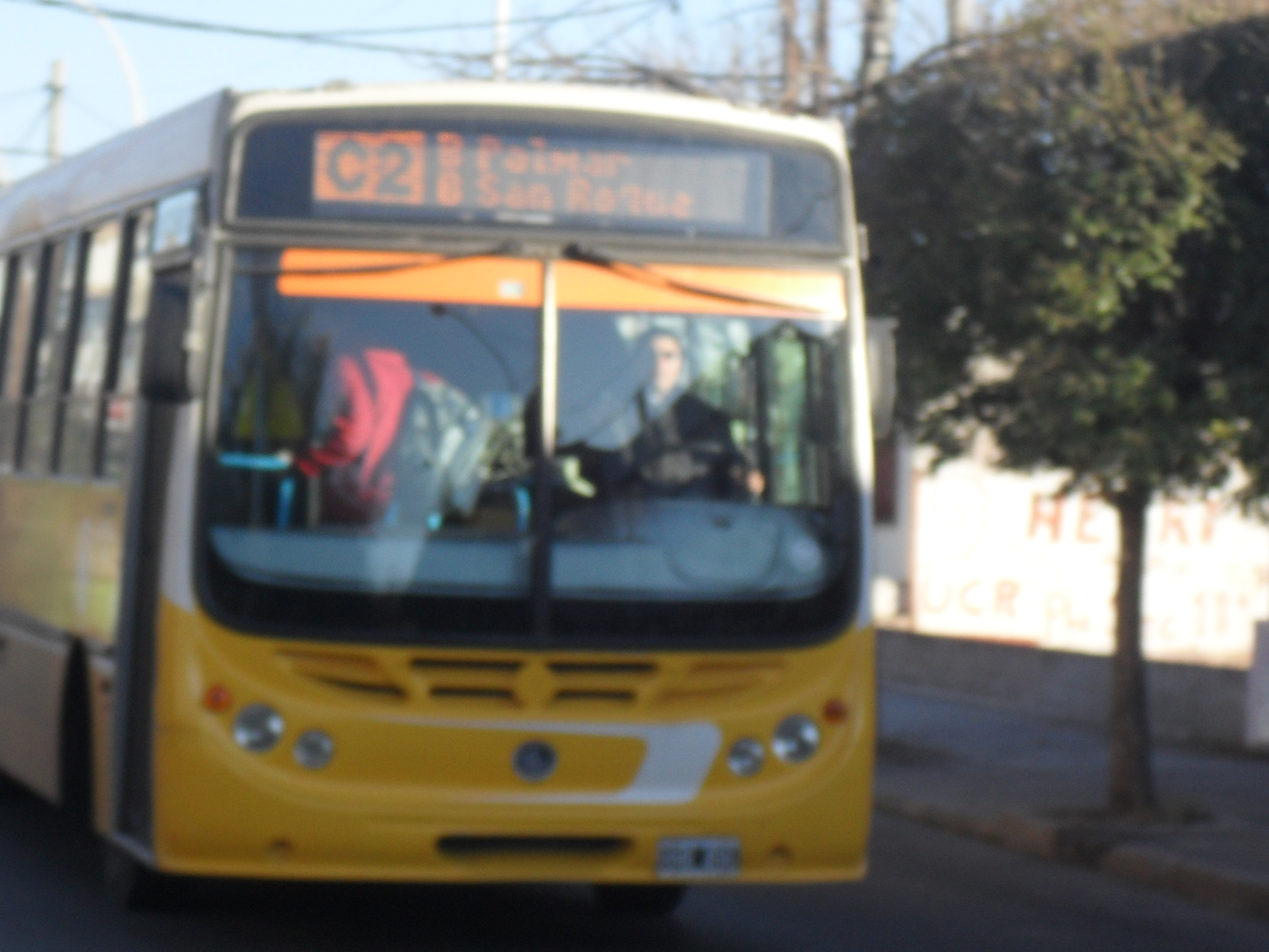 Unidad de la línea C2 de la empresa CONIFERAL SACIF. Córdoba. Argentina.